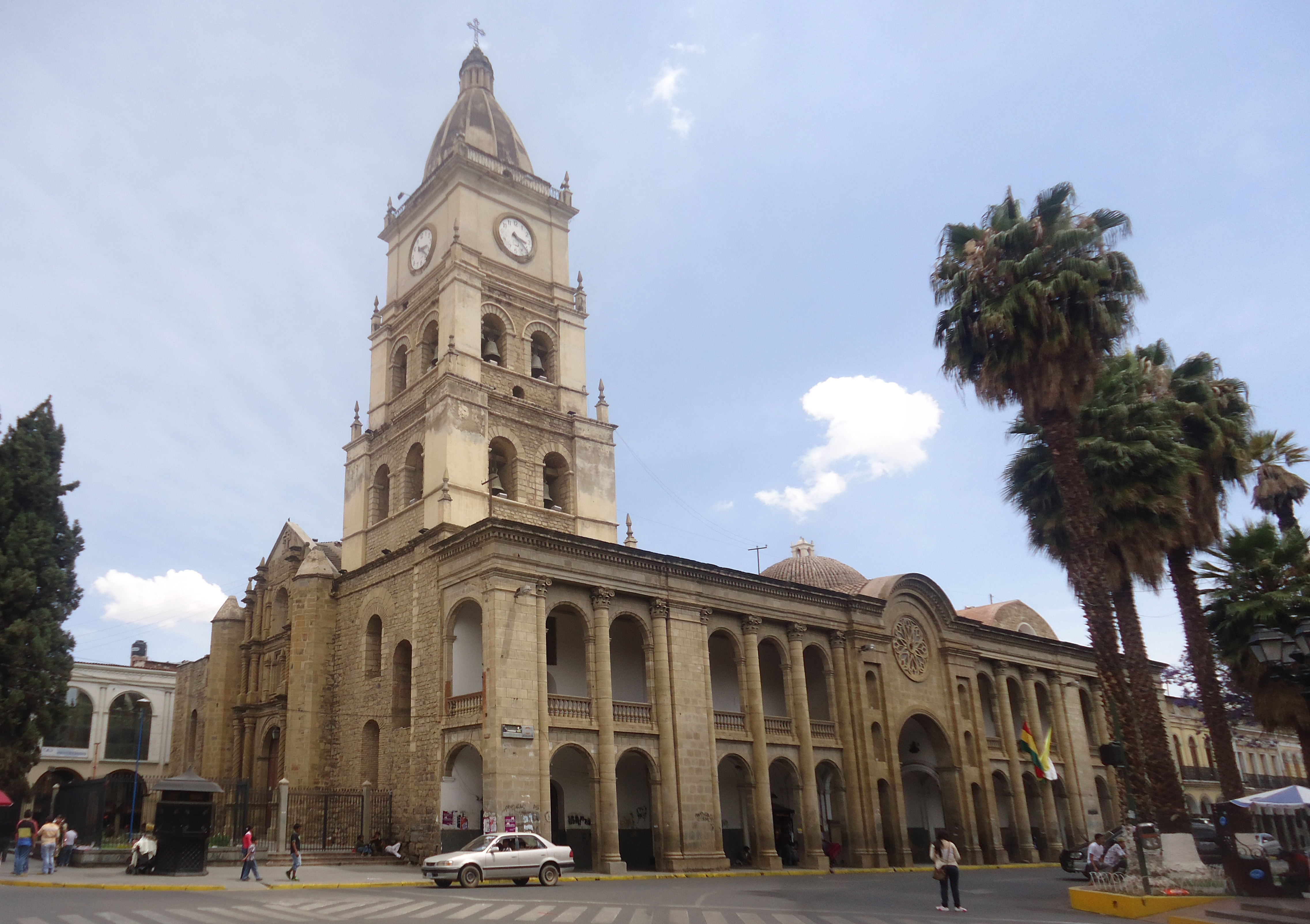 Catedral Metropolitana cochabamba This medium shows the protected monument with the number C/00-000 in Bolivia.